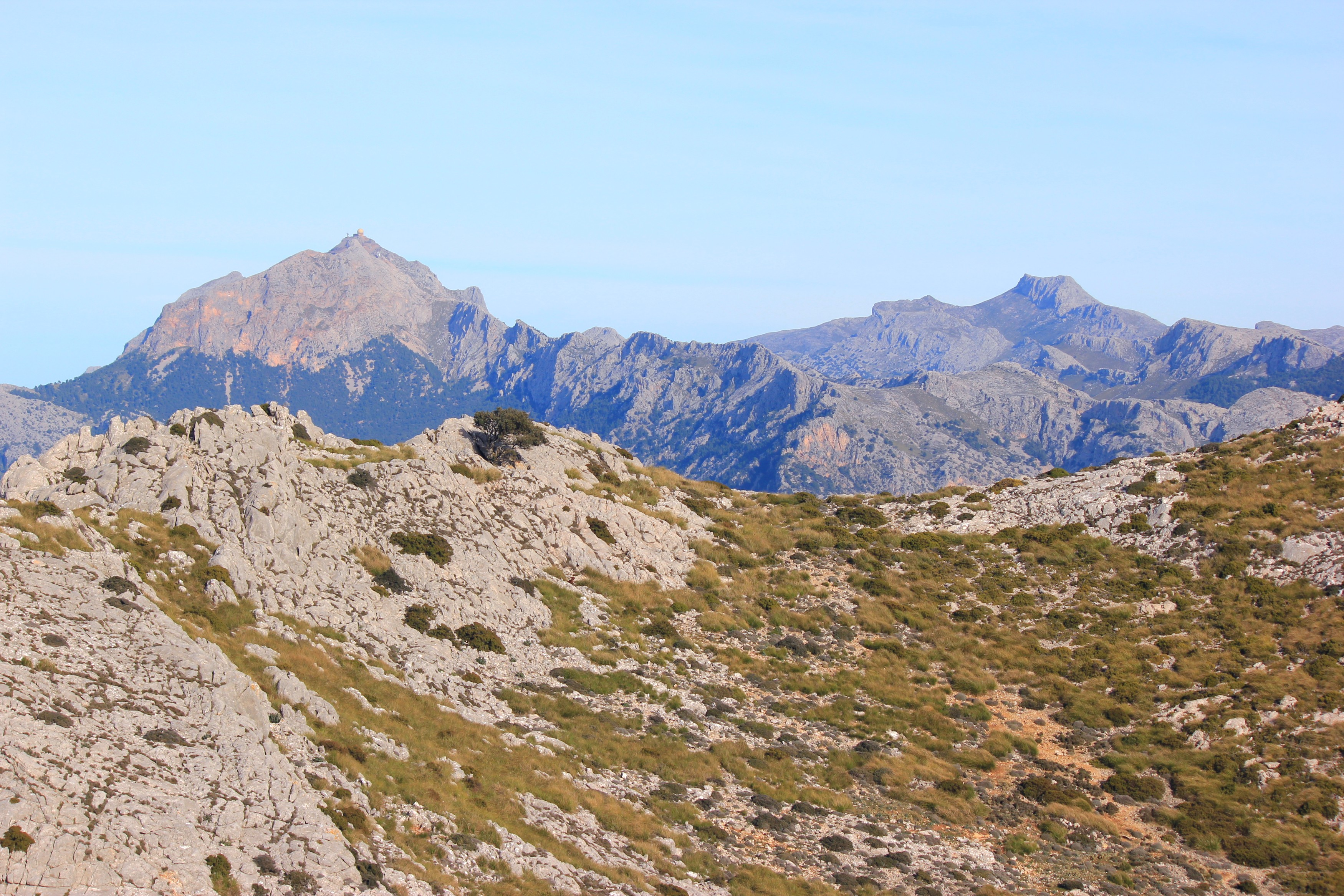 Blick vom Puig des Teix zum Puig Major.